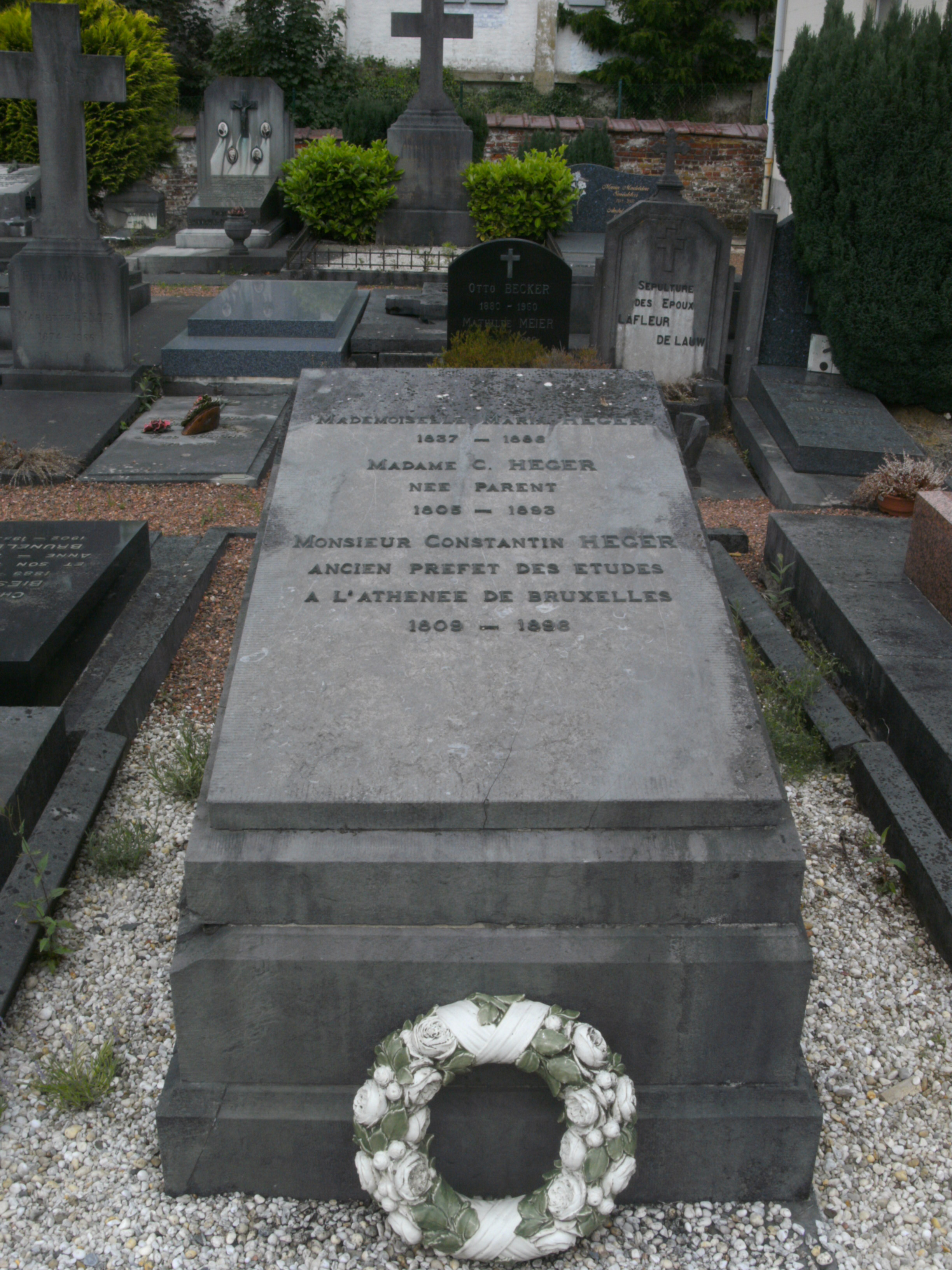 Sépulture de Contantin Héger, de sa seconde épouse, Claire Parent, et de leur fille Marie dans le cimetière de Watermael-Boitsfort (allée n°104)